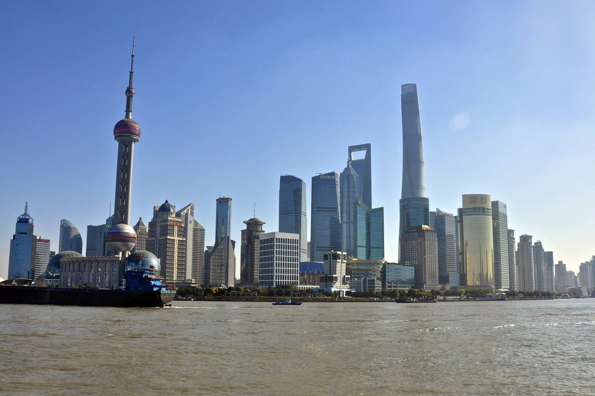 Shanghai, China